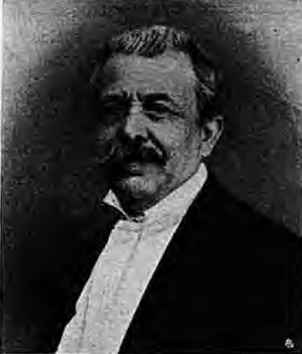 Italian Painter Ciro Punzo